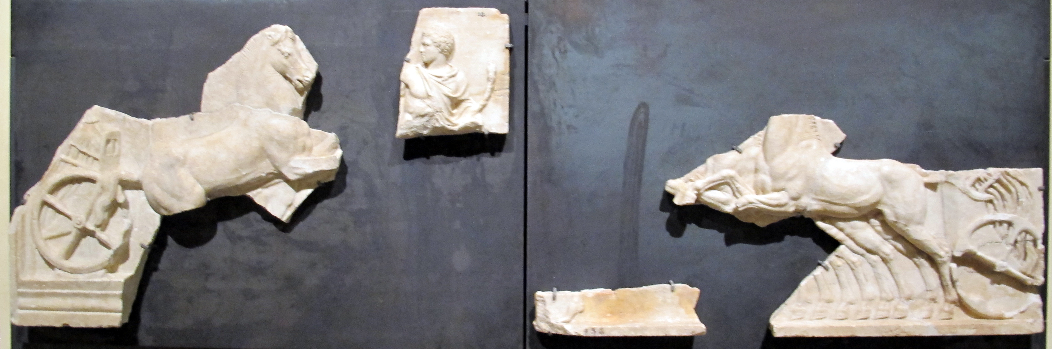 Musei Capitolini